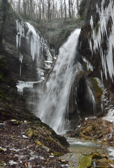 Водопад Наджиго зимой